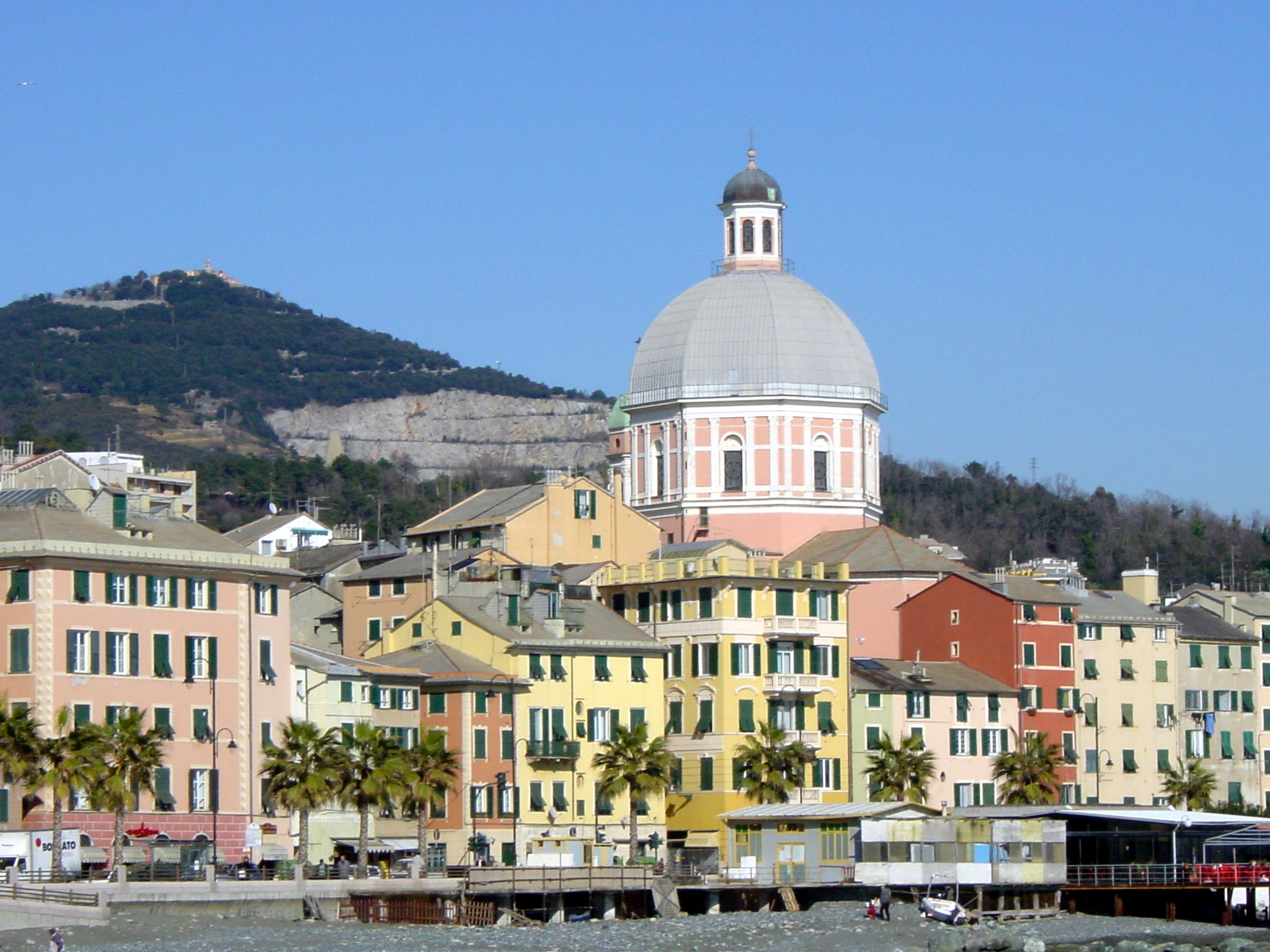 Pegli, il cupolone della Chiesa dell'Immacolata, il Monte Gazzo segnato dalle cave e la parte est della passeggiata restaurata.